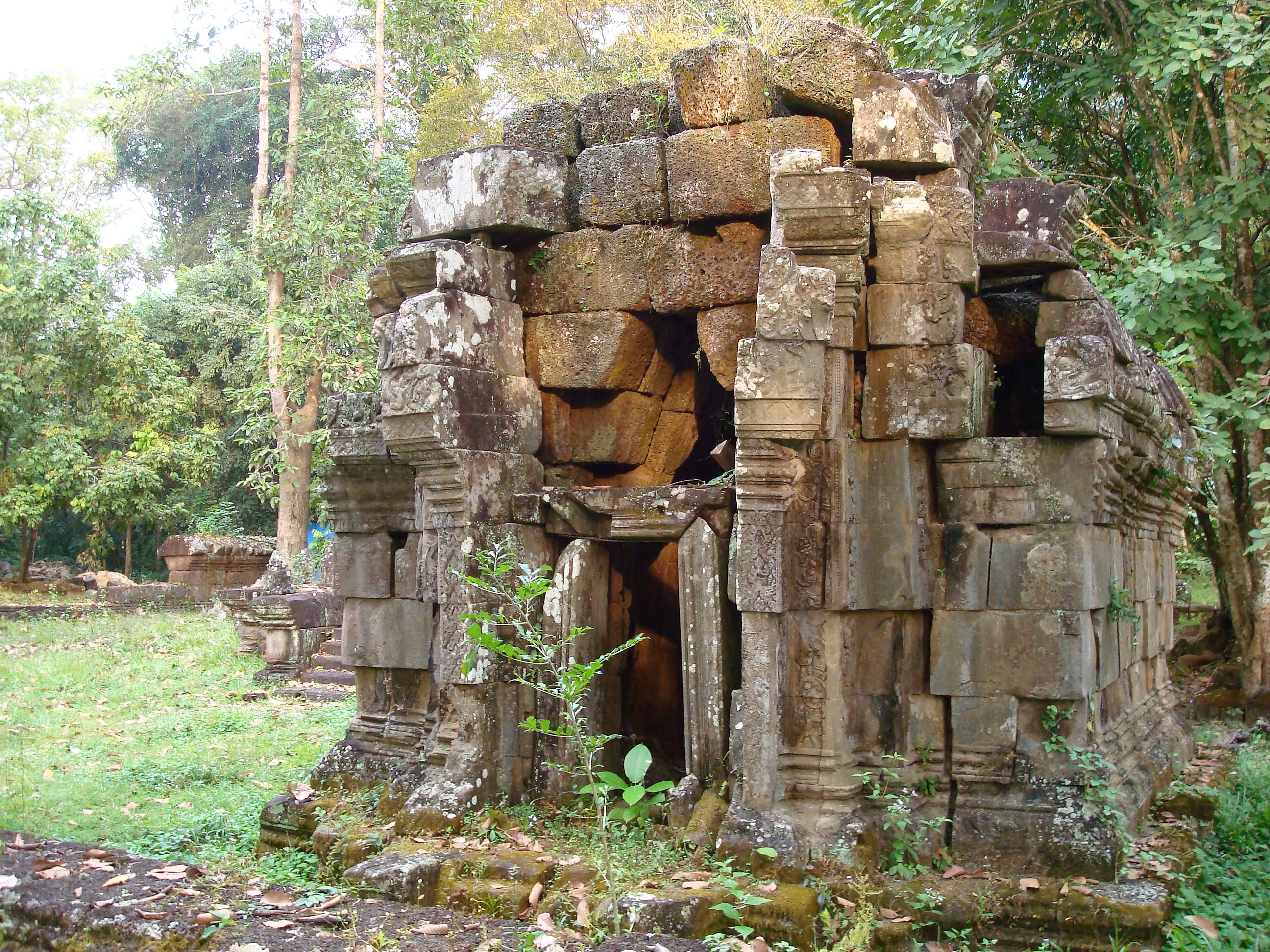 Bibliothek im nördlichen Khleang